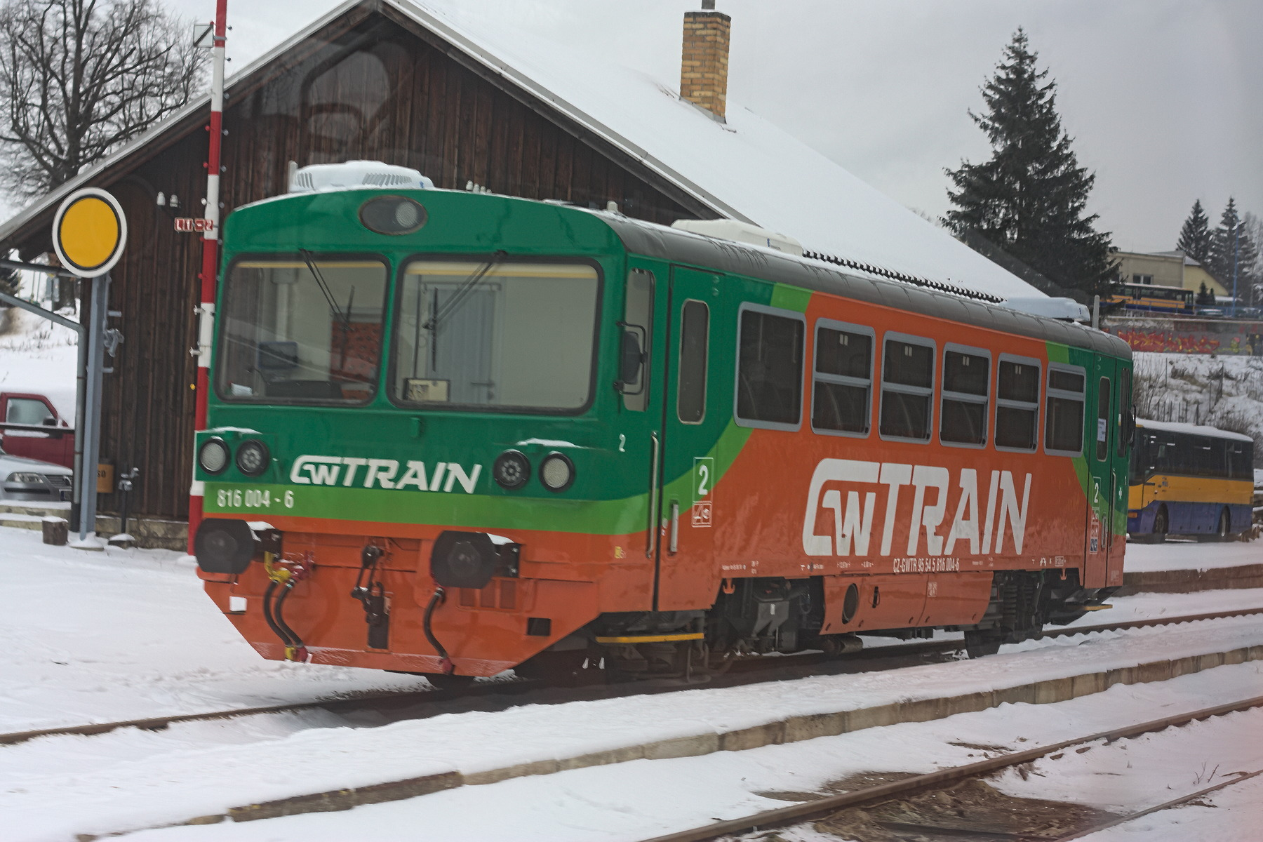 GwTrain816 004-6 wartet am Bahnhof Vimperk (Winterberg)